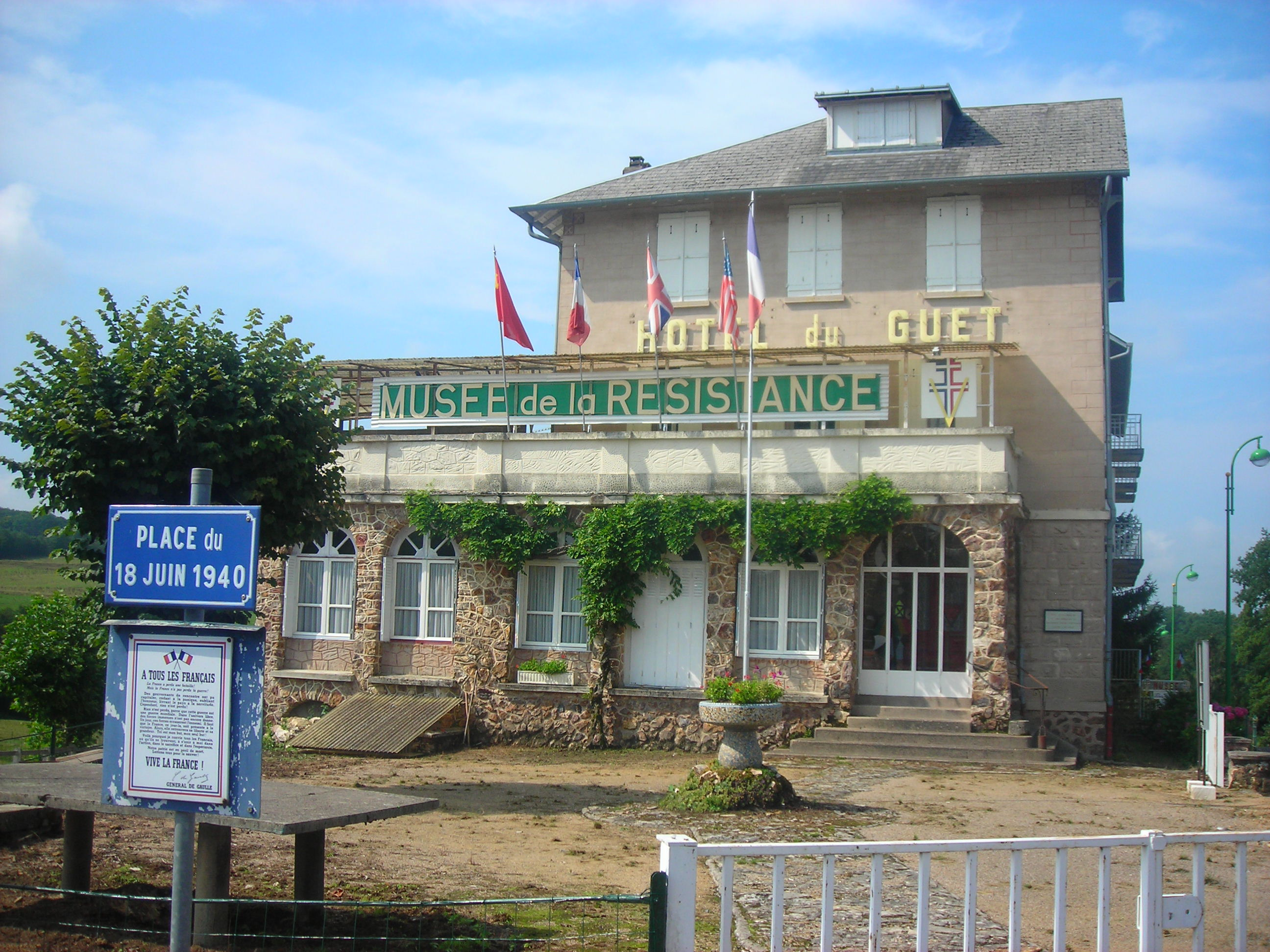 FacadeMuséeResistance